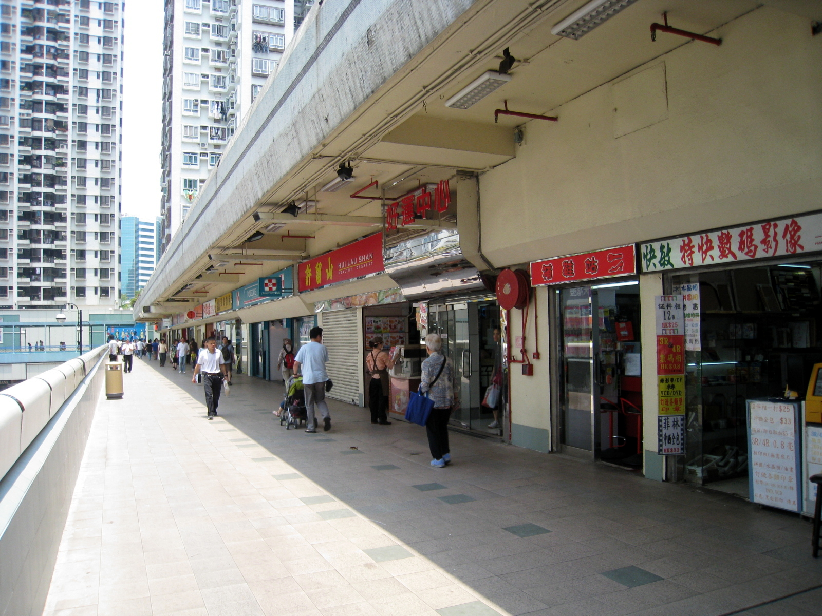 HK Lucky Plaza Level 3 Outside Access